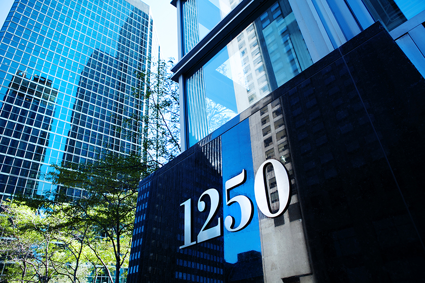 L'adresse du siège social de l'ordre depuis le 2 mai 2016